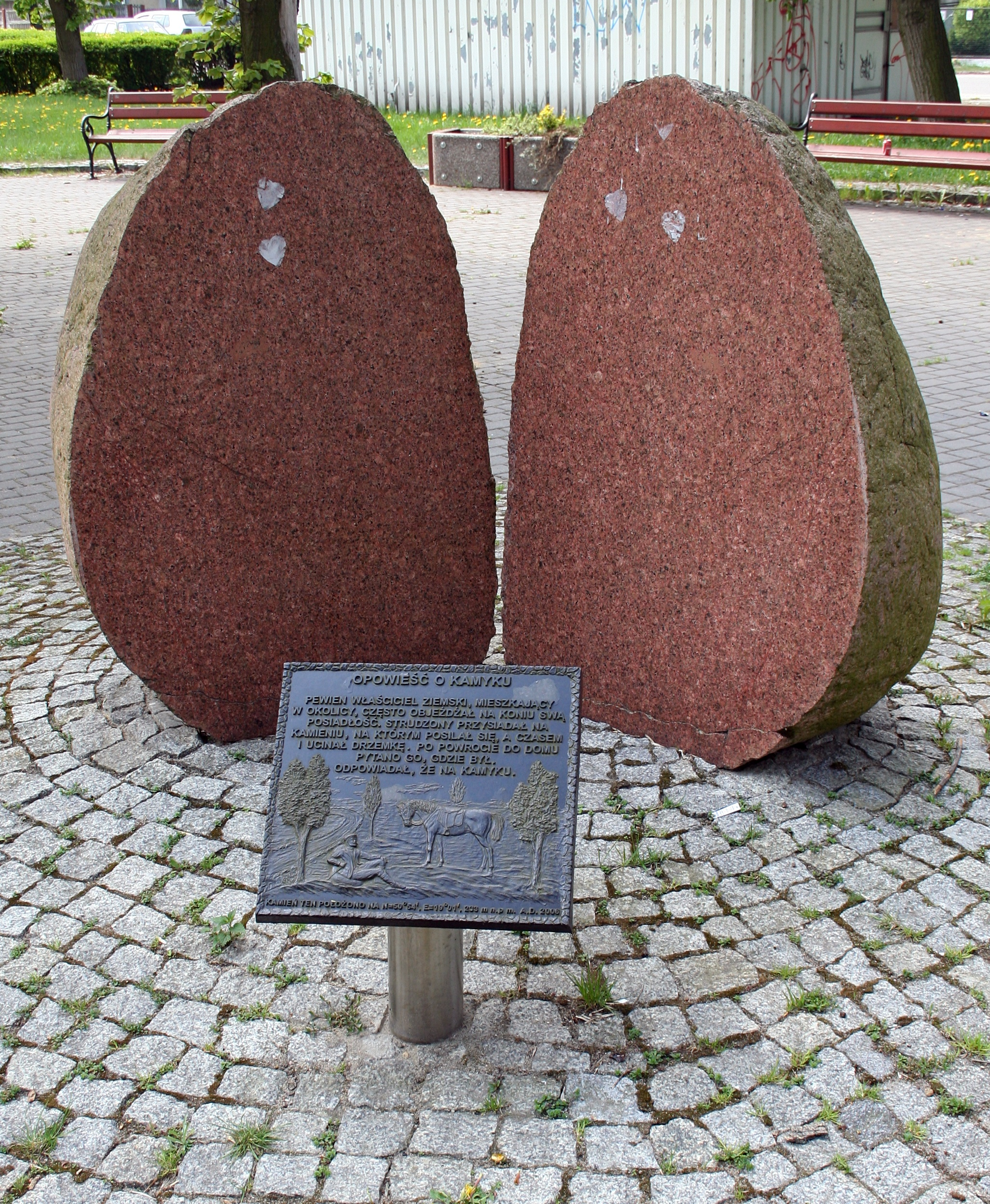 Pomnik oraz tablica przedstawiająca legendę dot. nazwy wsi Kamyk, woj. śląskie